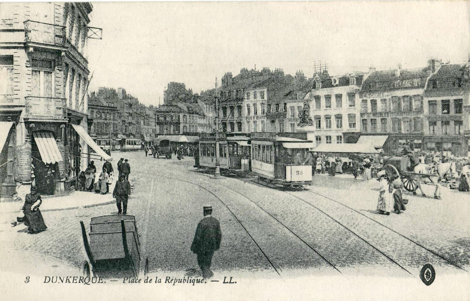 Carte postale ancienne éditée par LL, n°3 : DUNKERQUE - Place de la République